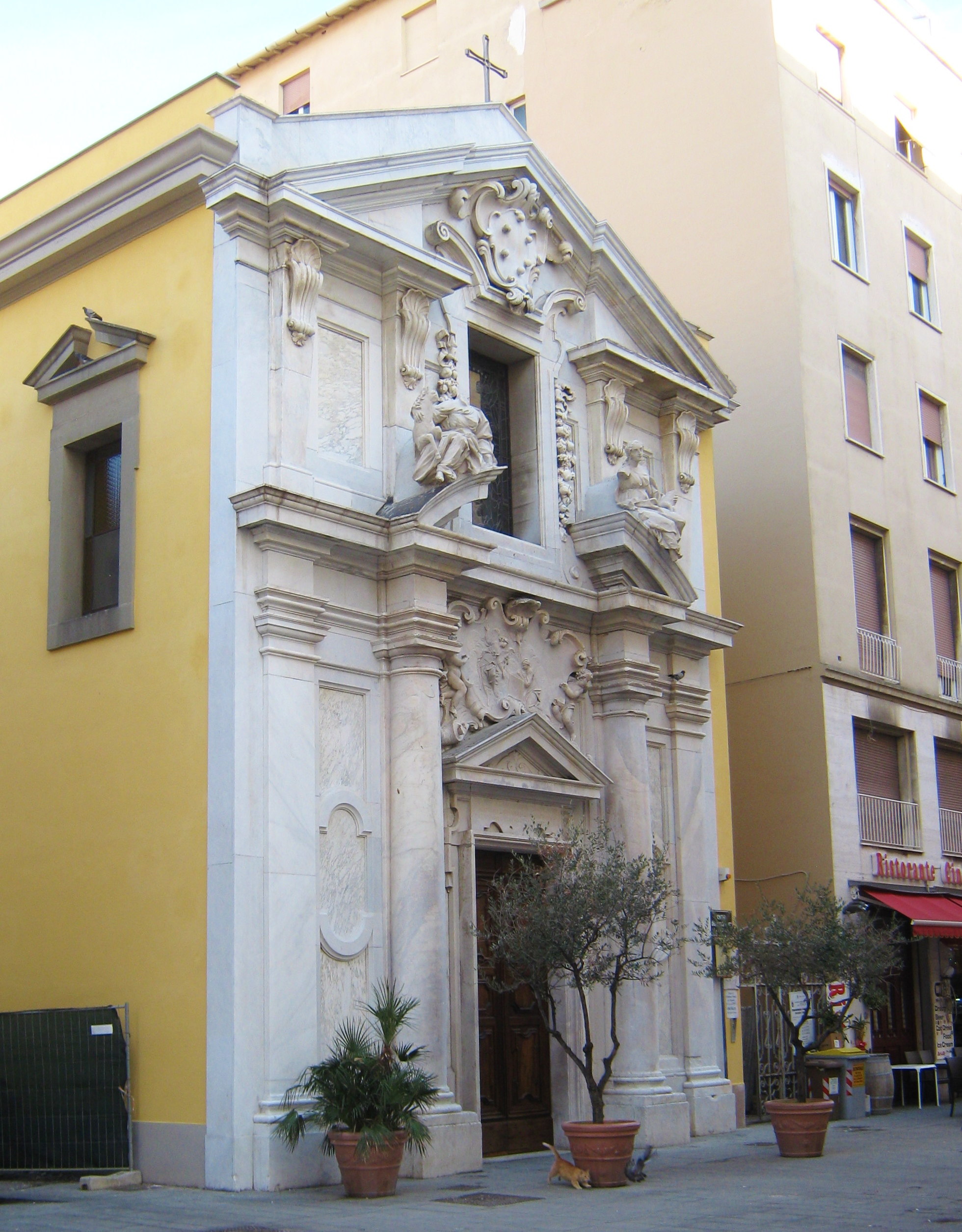 Livorno: la facciata dell'ex chiesa greca della Santissima Annunziata, ora della Purificazione, dopo il restauro che ha permesso di ricollocarvi due copie delle statue dell'Innocenza e della Mansuetudine. Il disegno della facciata è attribuito a Baratta o Foggini.